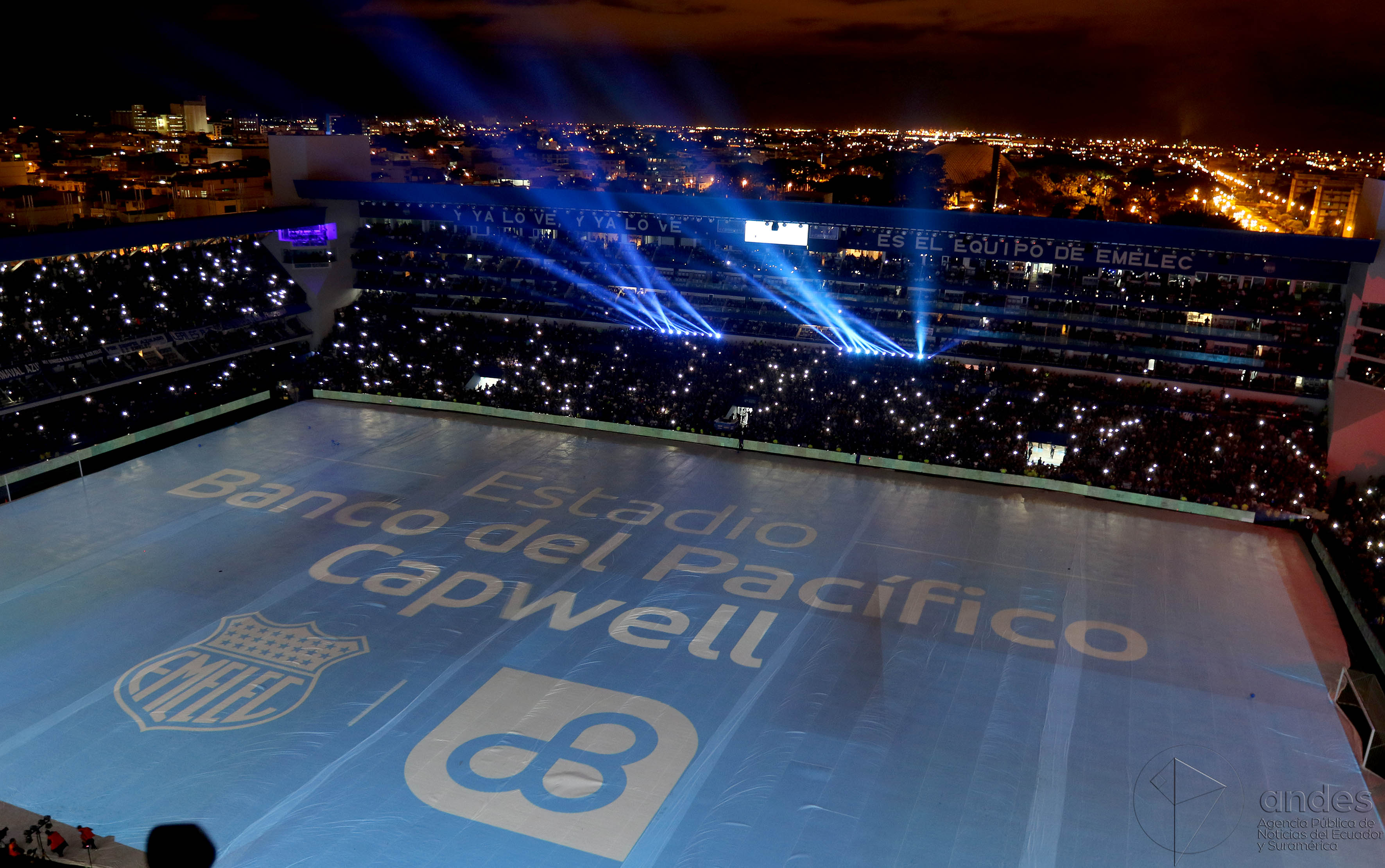 Guayaquil, miércoles 08 de febrero del 2017 (Andes).-Con una capacidad para cerca de 40 mil espectadores, sistemas tecnológicos y nuevo estilo arquitéctonico se reinaguró el estadio Arena Banco del Pacifico-Capwell. Foto:Andes/César Muñoz